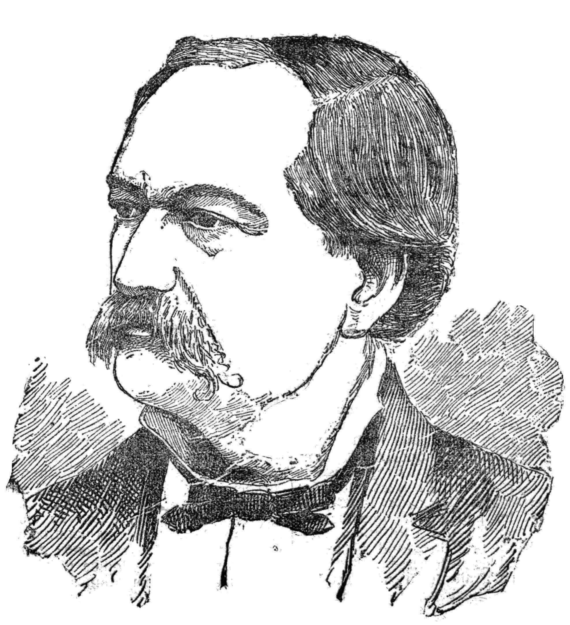 Frébault.